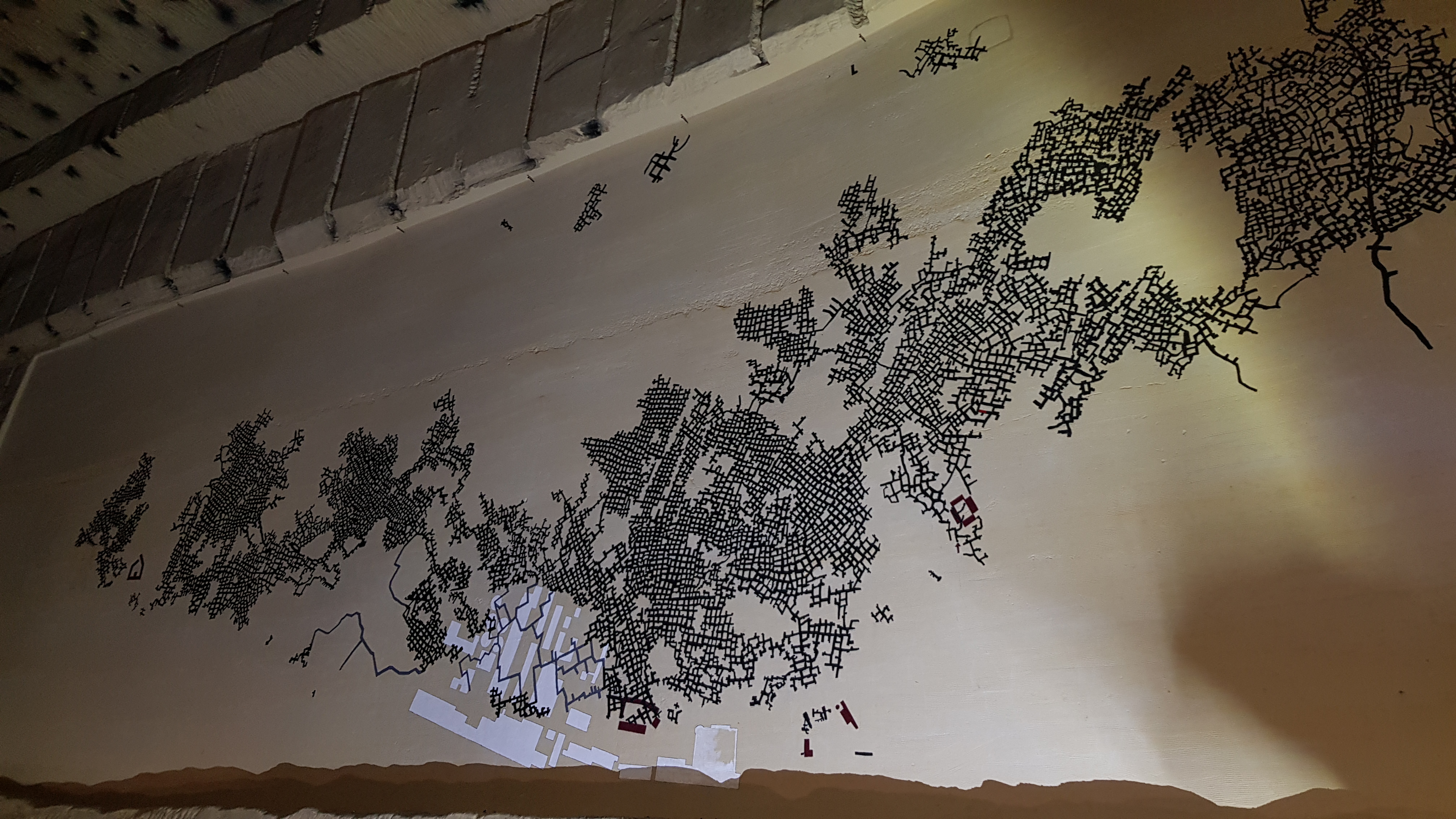 Gangenstelsel Zonneberg in de Sint-Pietersberg, Maastricht, Nederland